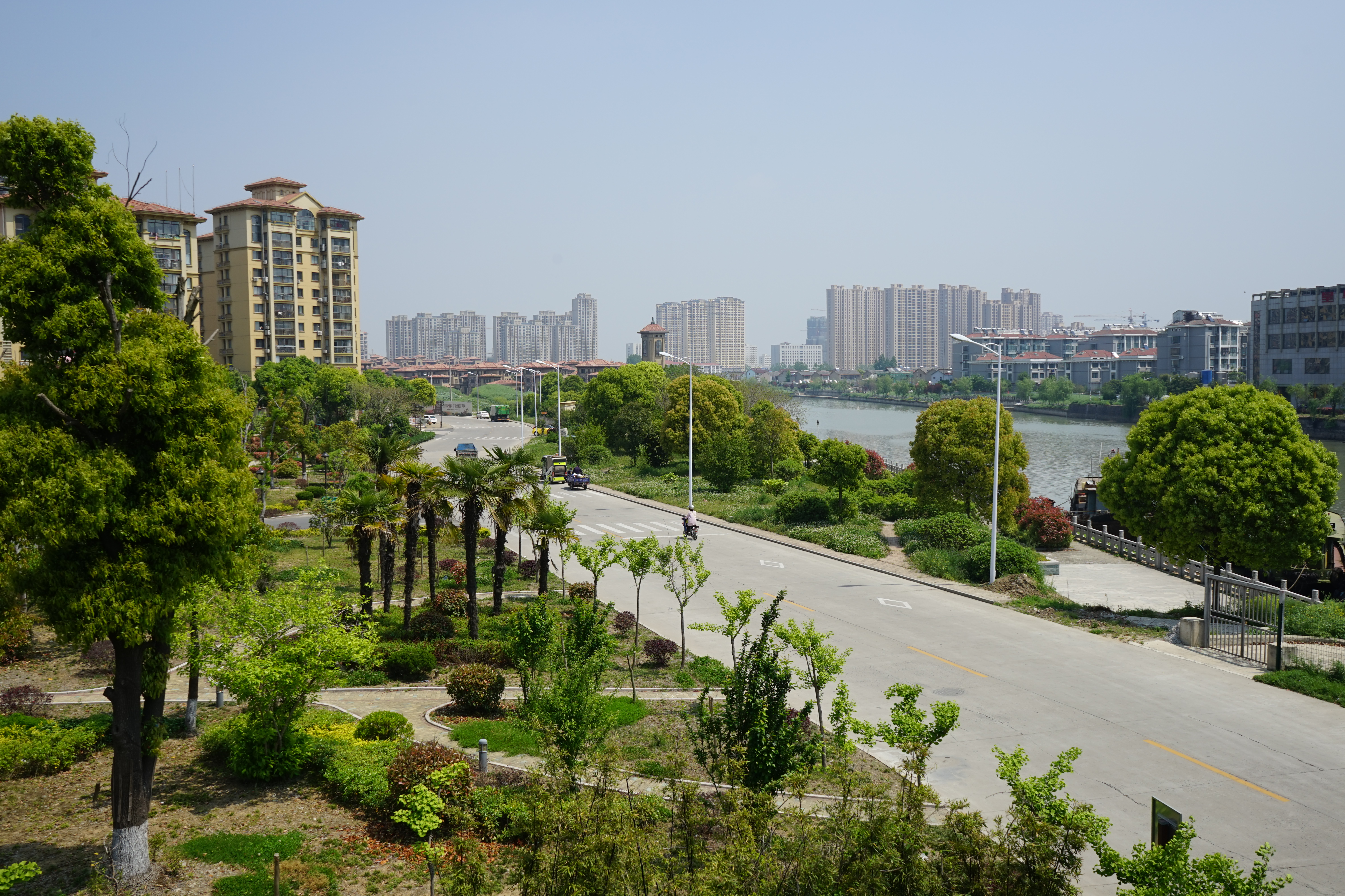 高邮海潮大桥向北眺望